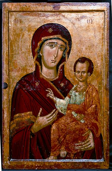 Богородица Патеводителка